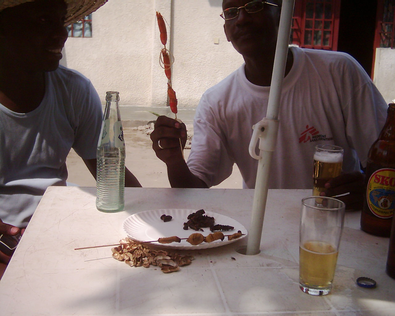 Congolese food : Gambas et Vers en brochettes, sauterelles grillées. Kinkole, Kinshasa 2003 Personal picture, I set it in public domain.